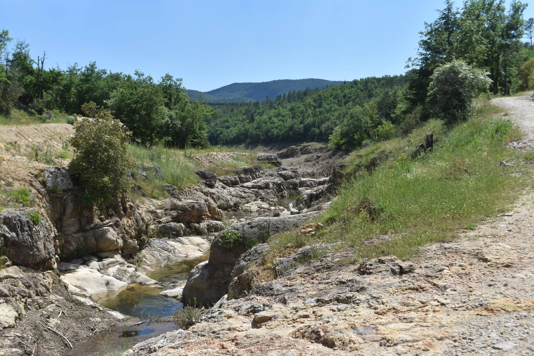 Riou de Méaulx